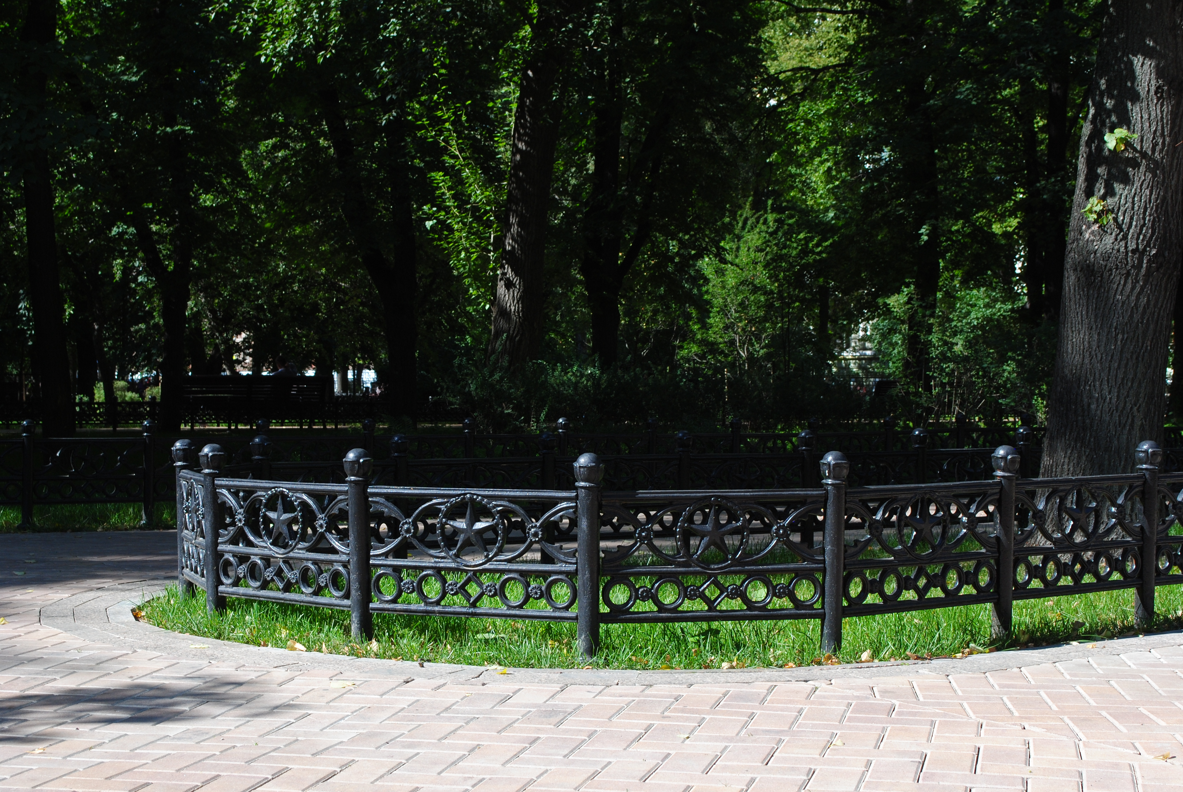 Декоративная ограда в Миусском сквере на Миусской площади